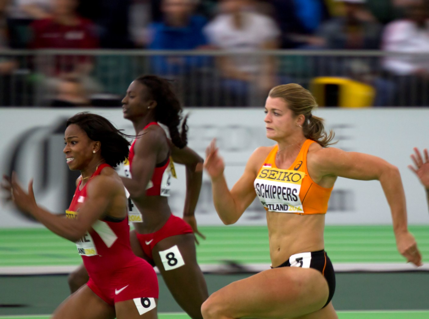 569 finale 60m dames